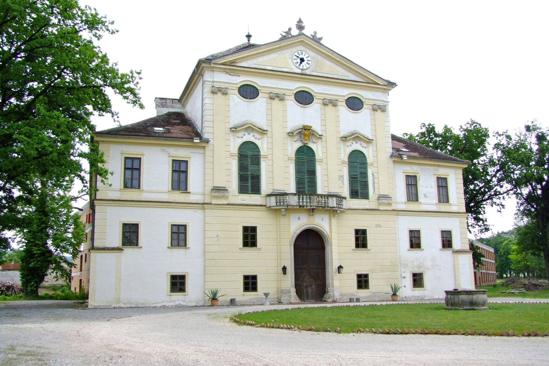 Schloss Kirchstetten/Thermalhotel